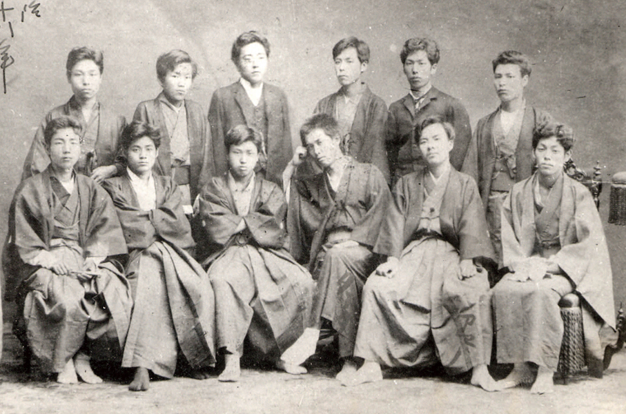 Premiers étudiants de l'Université Waseda en 1882